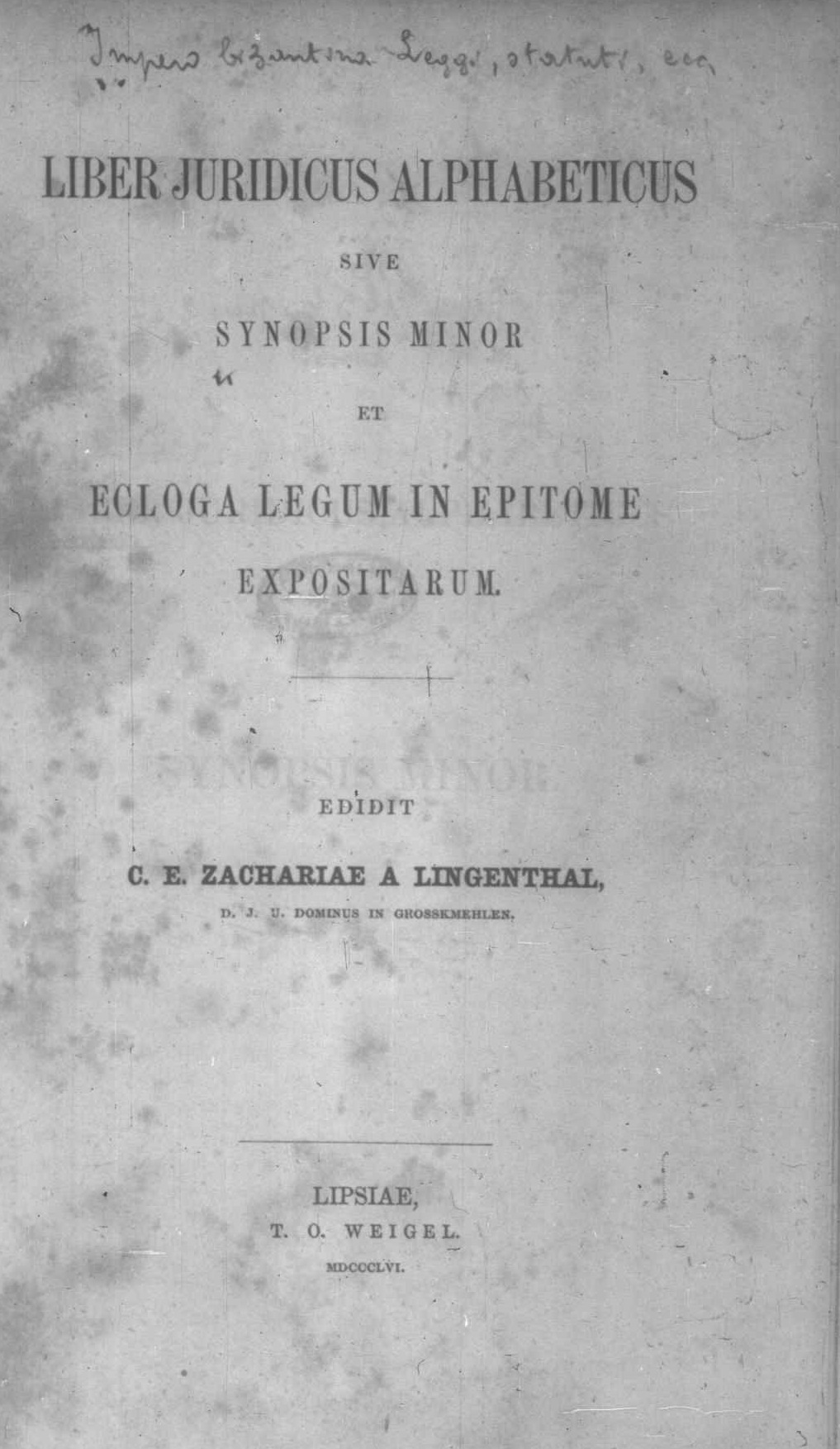 Frontespizio